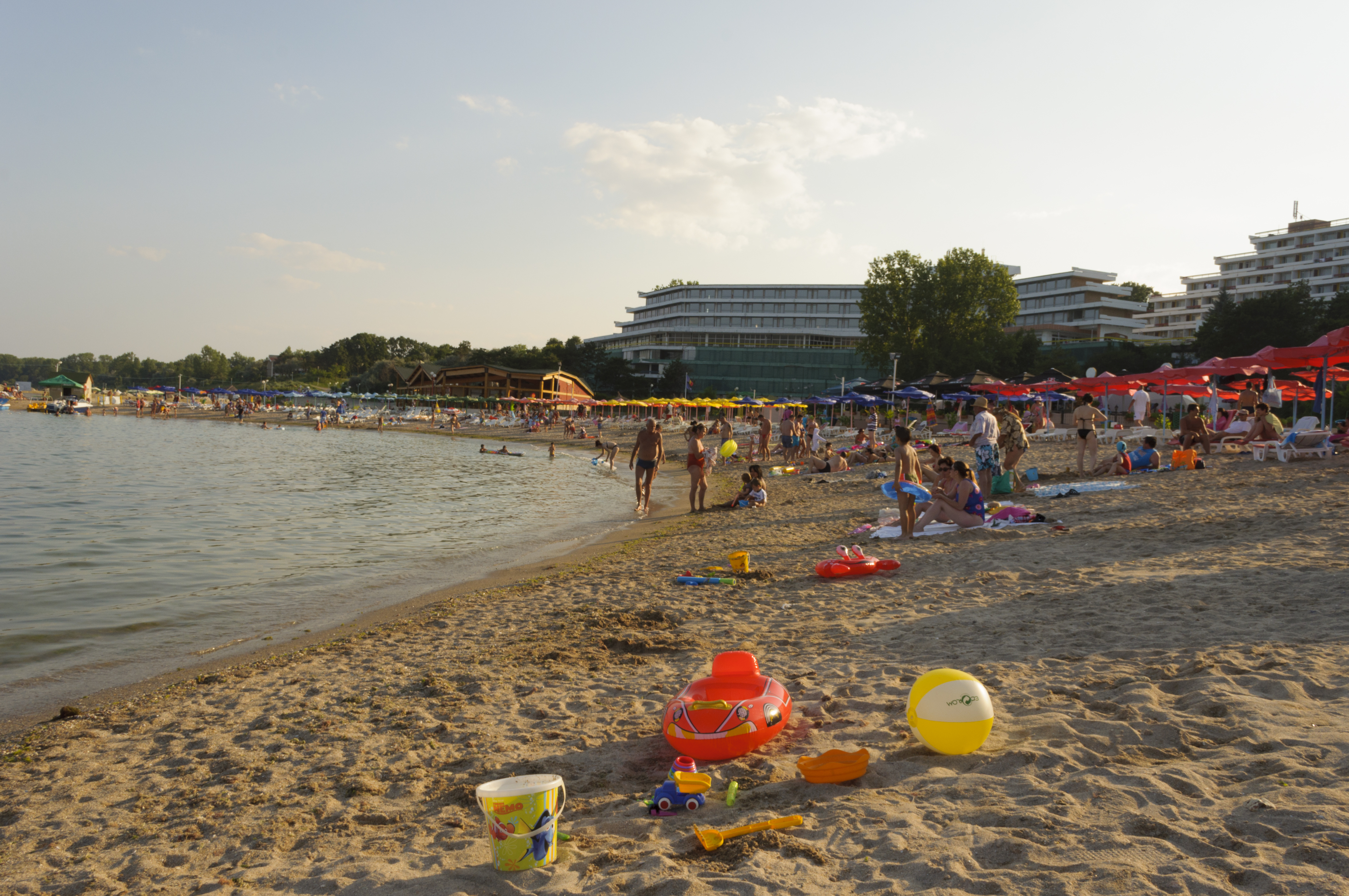 Olimp, Romania